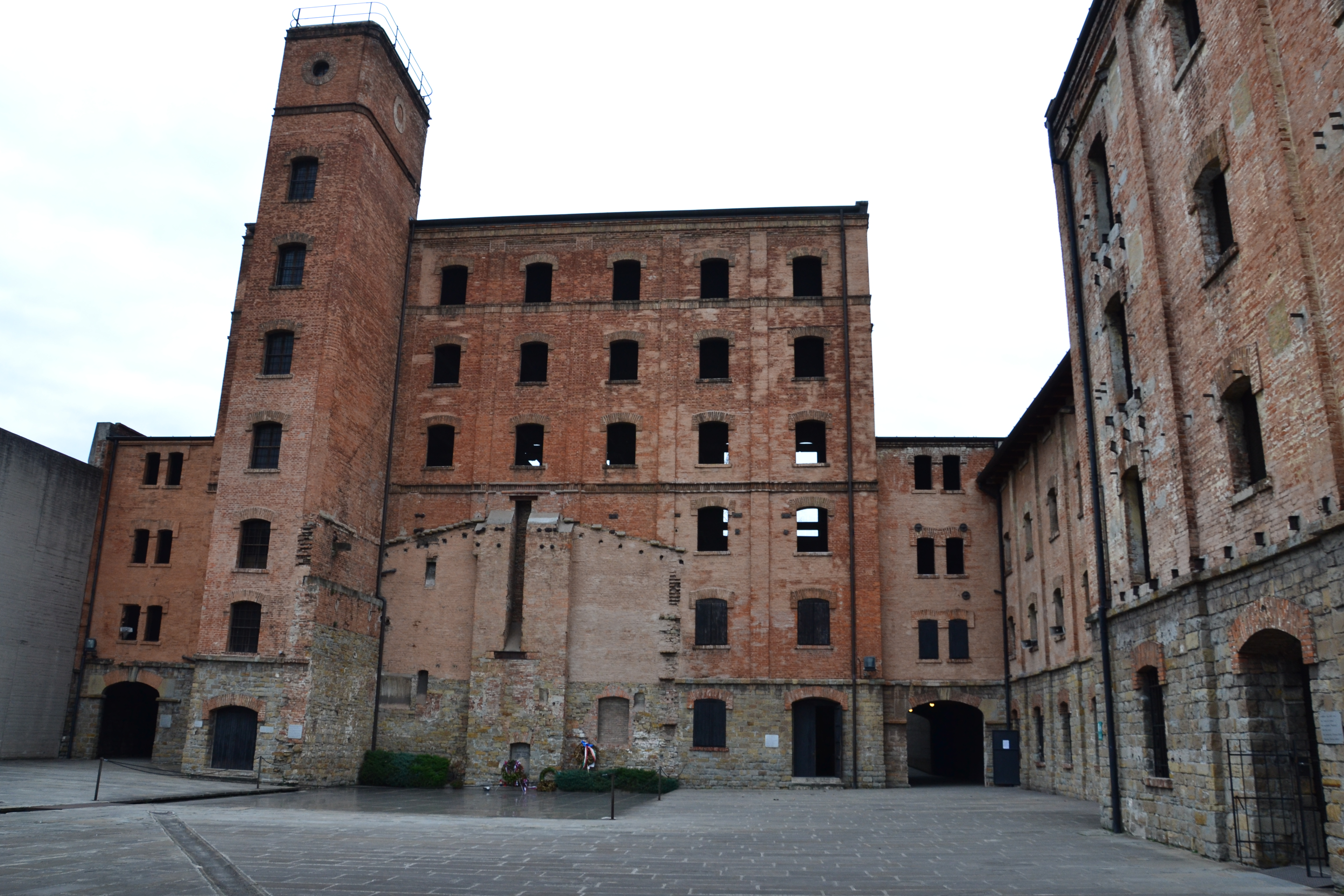 Rižarna.